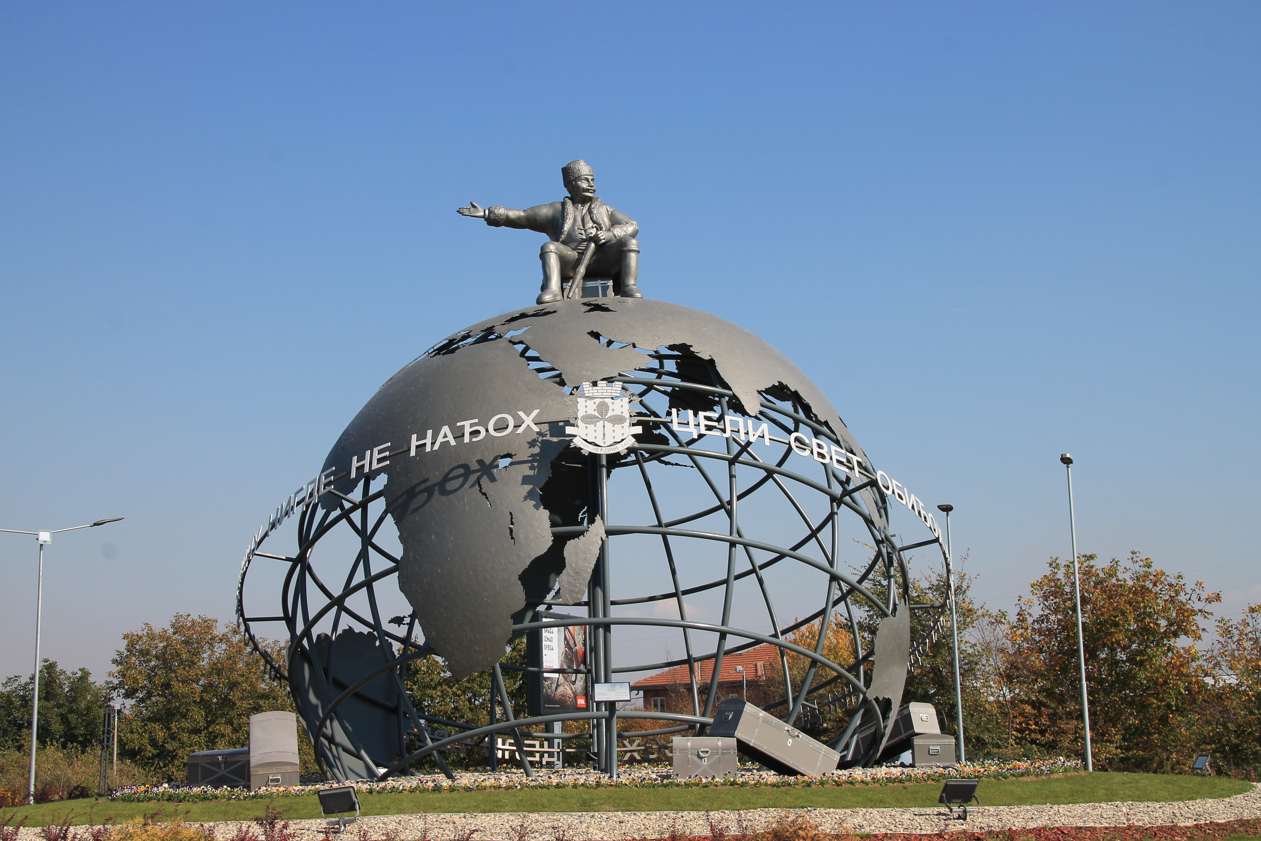 Spomenik Jovanča